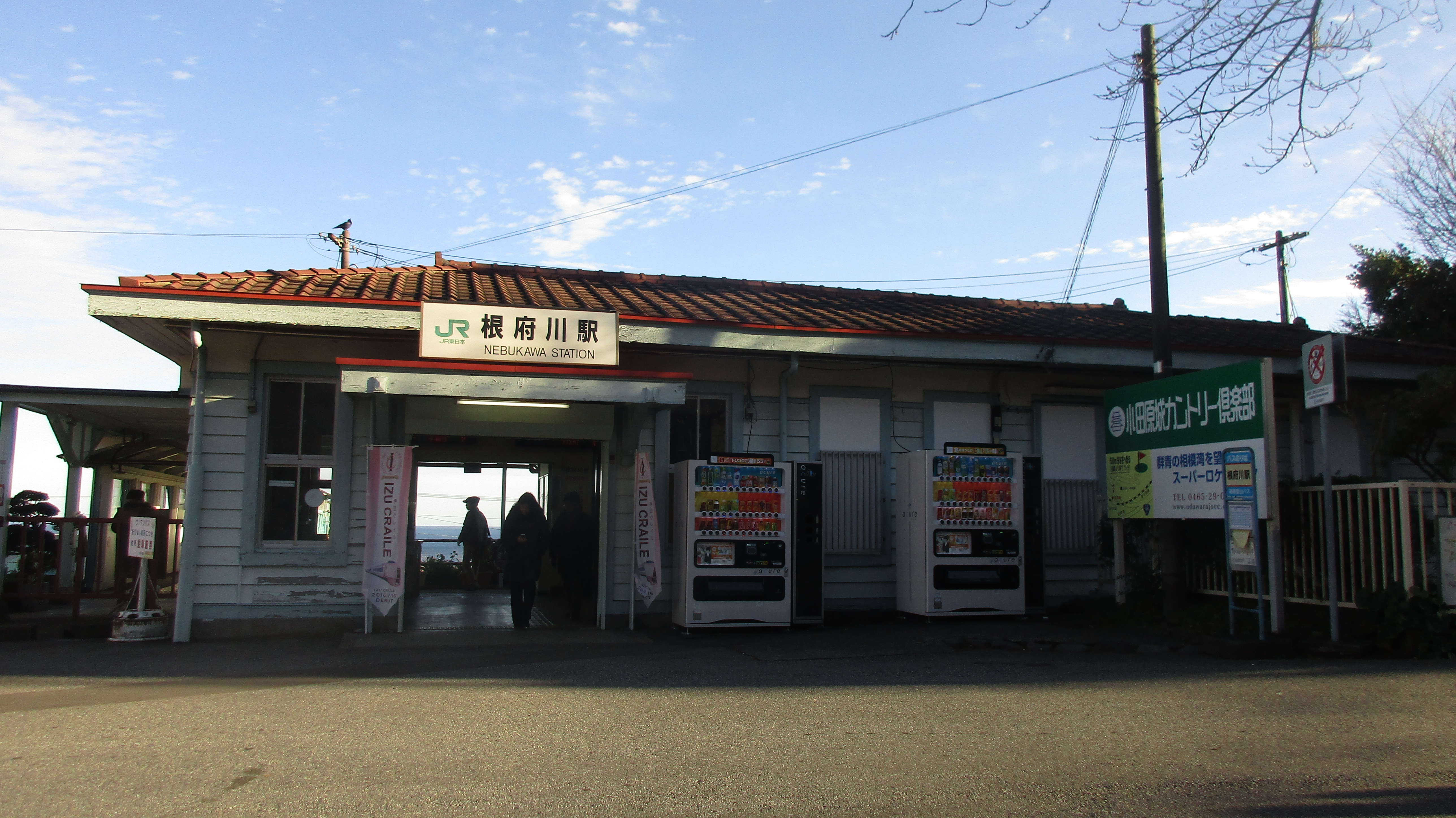 JR東海道本線 根府川駅舎